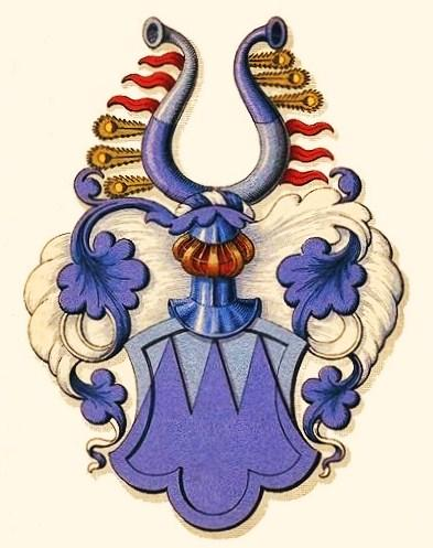 Wappen der Marschalck von Bachtenbrock, ursprünglich bremisches Uradelsgeschlechts.